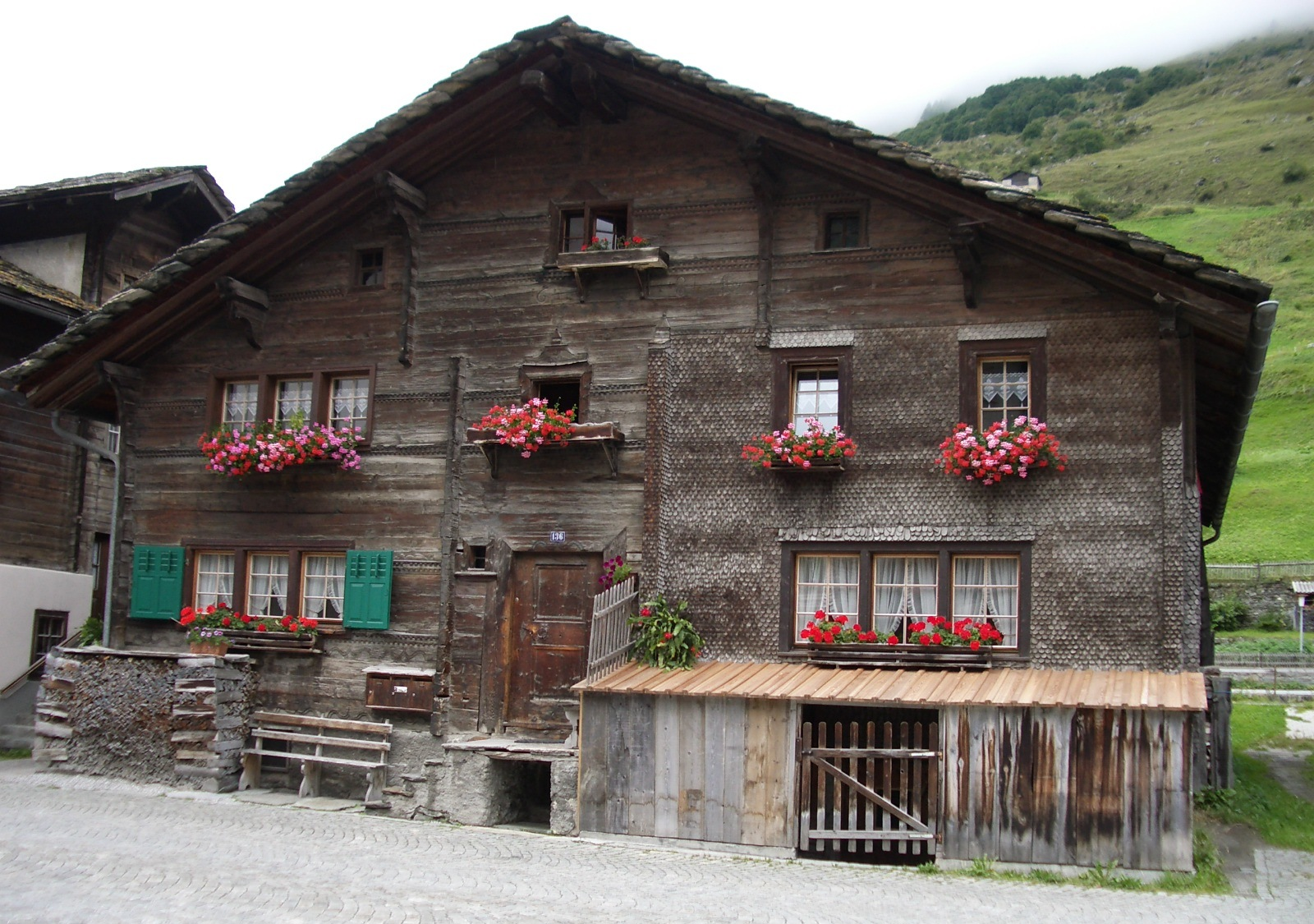 Vals GR, Switzerland self-made, August 2005